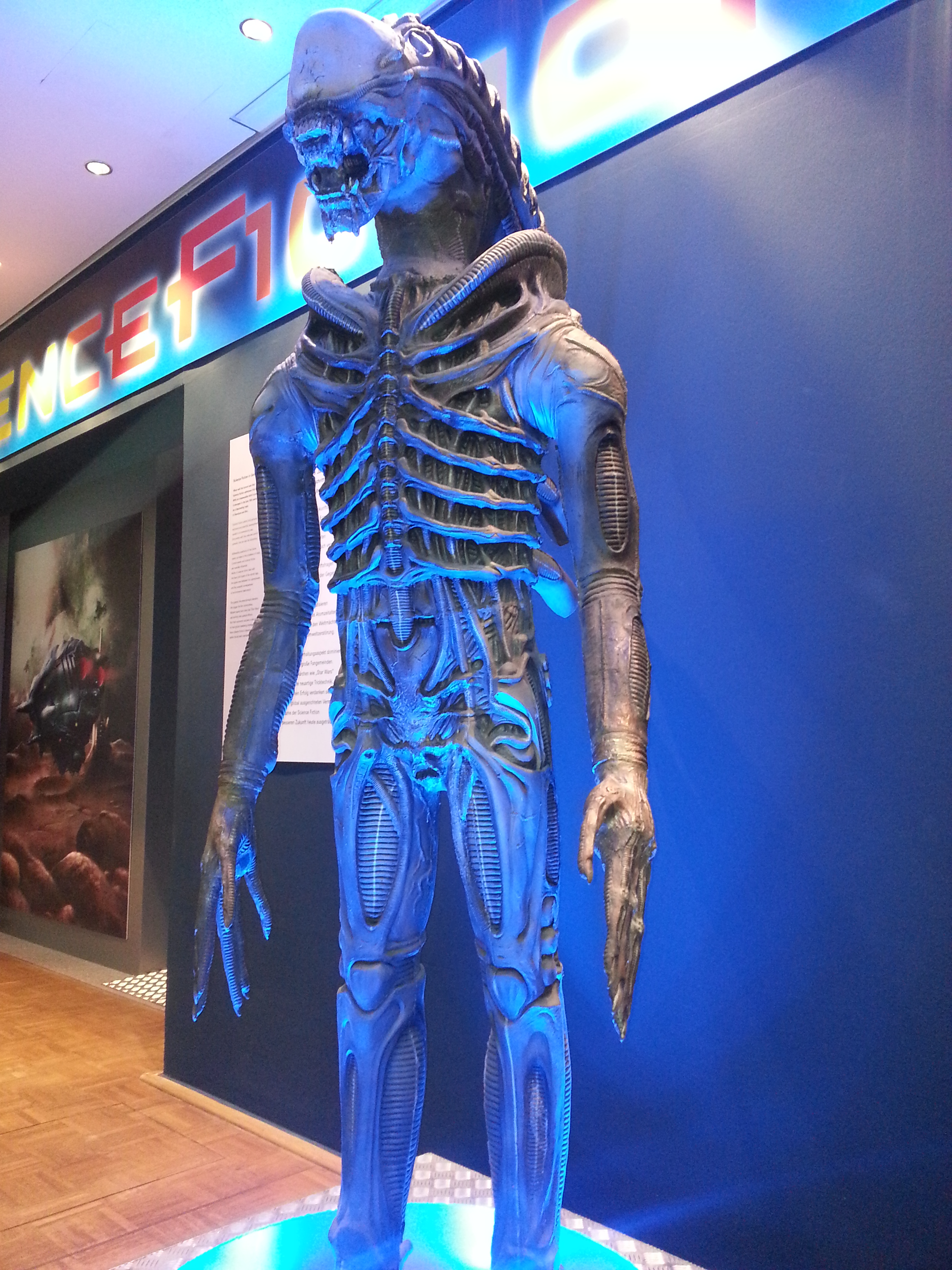 Ausstellung SF in Deutschland in Leipzig 2013